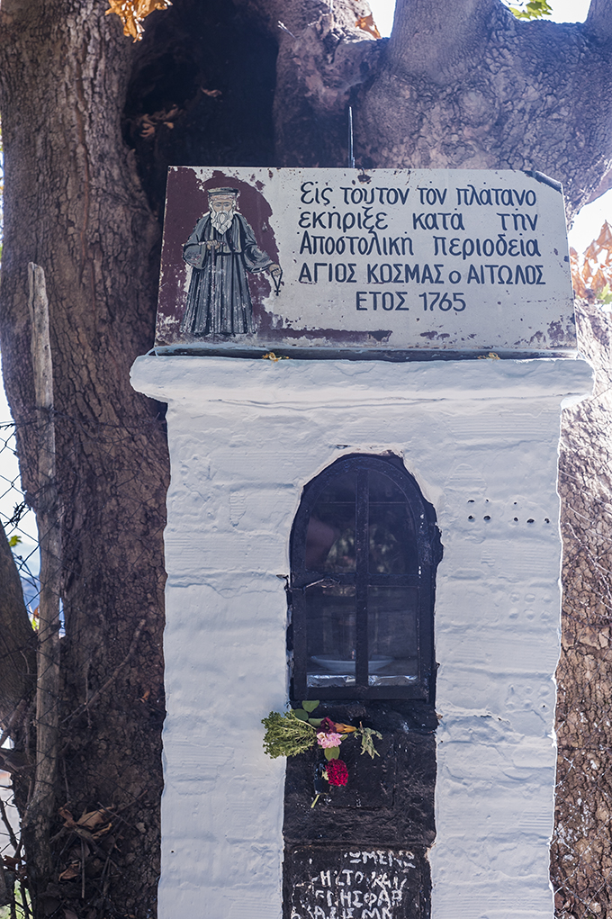 Το σημείο που δίδαξε ο Κοσμάς ο Αιτωλός.